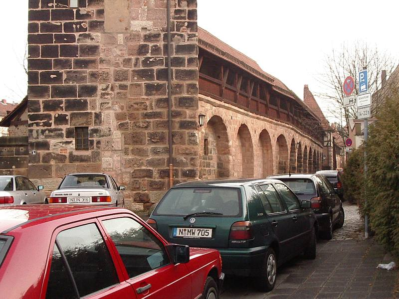 Nürnberg, Stadtmauer am Maxtor von der Stadtseite aus, östliche Fortsetzung von WSW (2003-12-17), groß. / Innenseite mit großen Blendbögen und Laufgang aus Holz (erneuert), Mauerwerk 2003(?) saniert und fehlende Teile ergänzt. In der Wirkung beeinträchtigt durch ruhenden Verkehr, der aus z.T. behindernd parkenden Autos besteht.